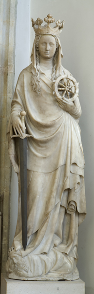 Hl. Catharina, André Beauneveu 1380